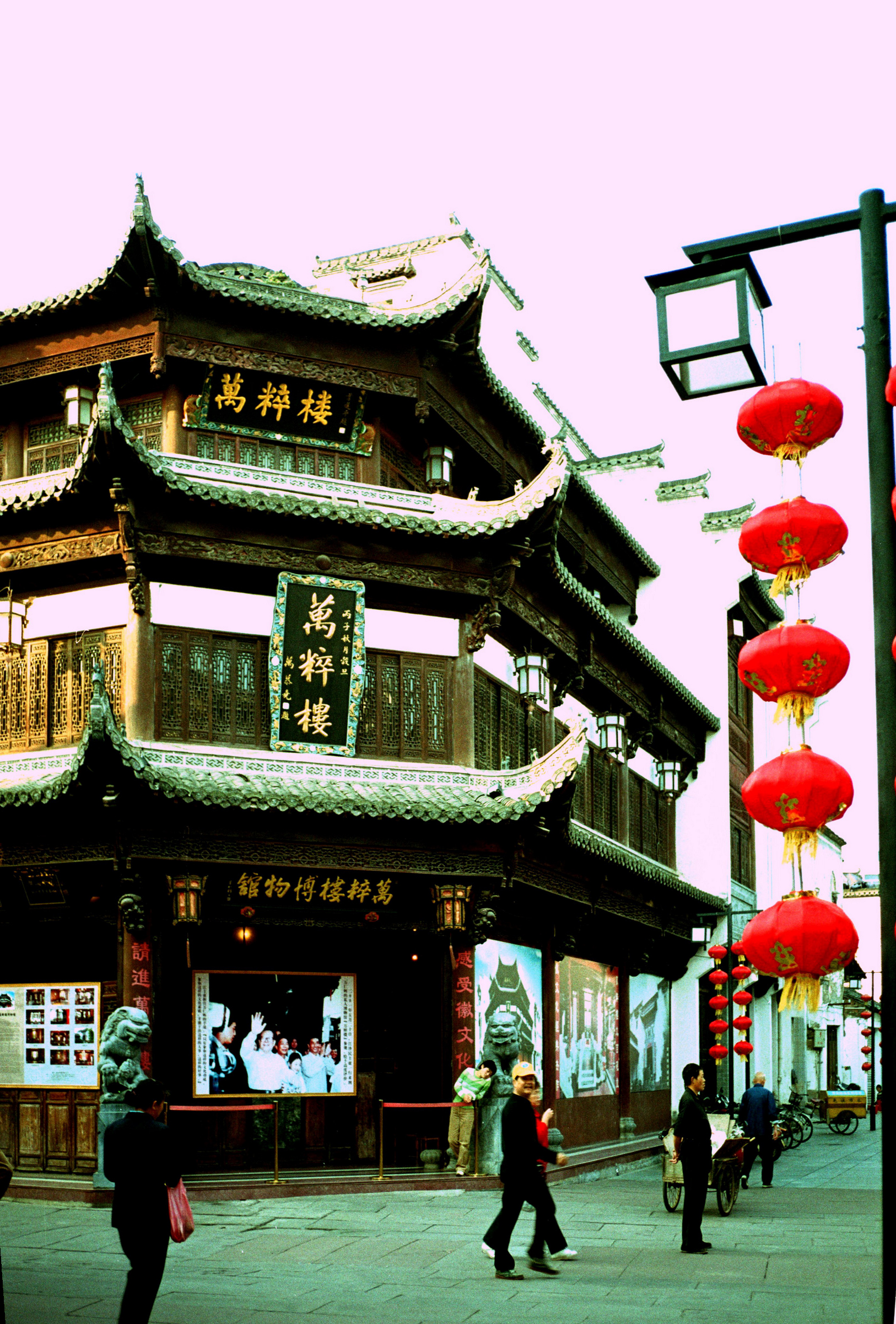 Tunxi Old Street Museum屯溪老街博物馆